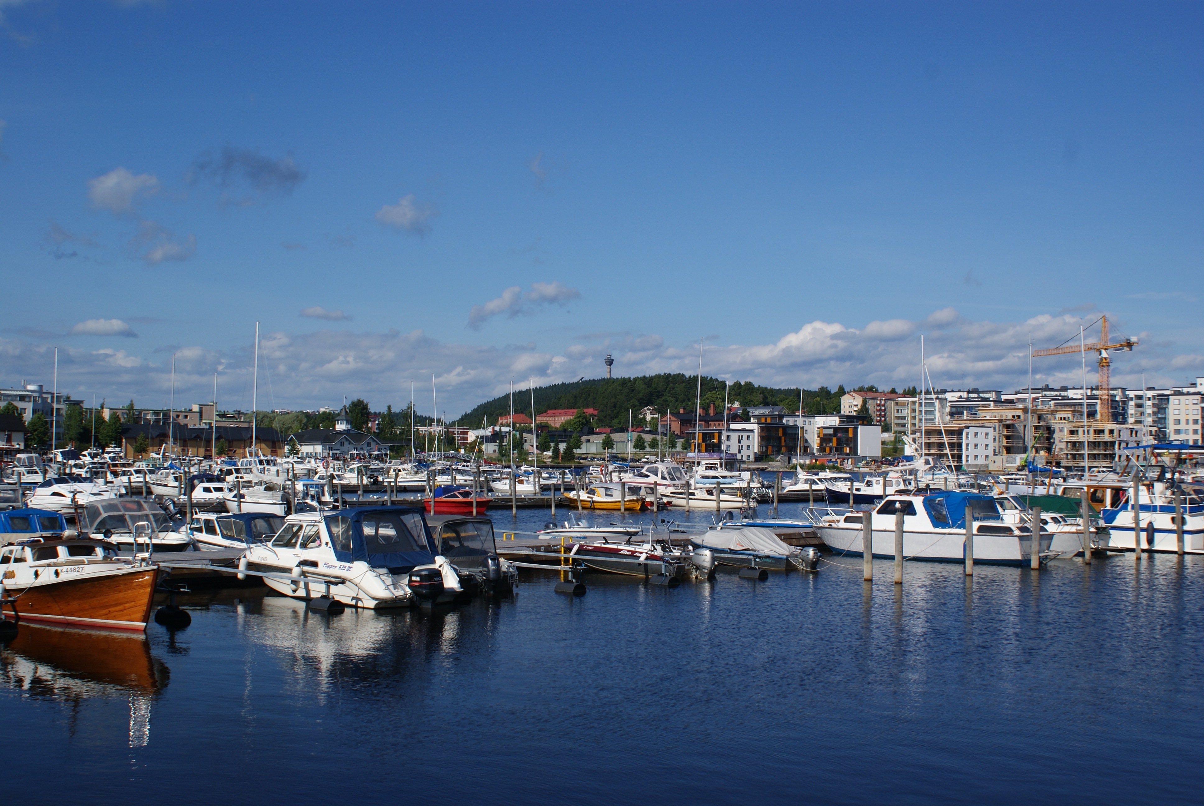 Kuopion venesatama